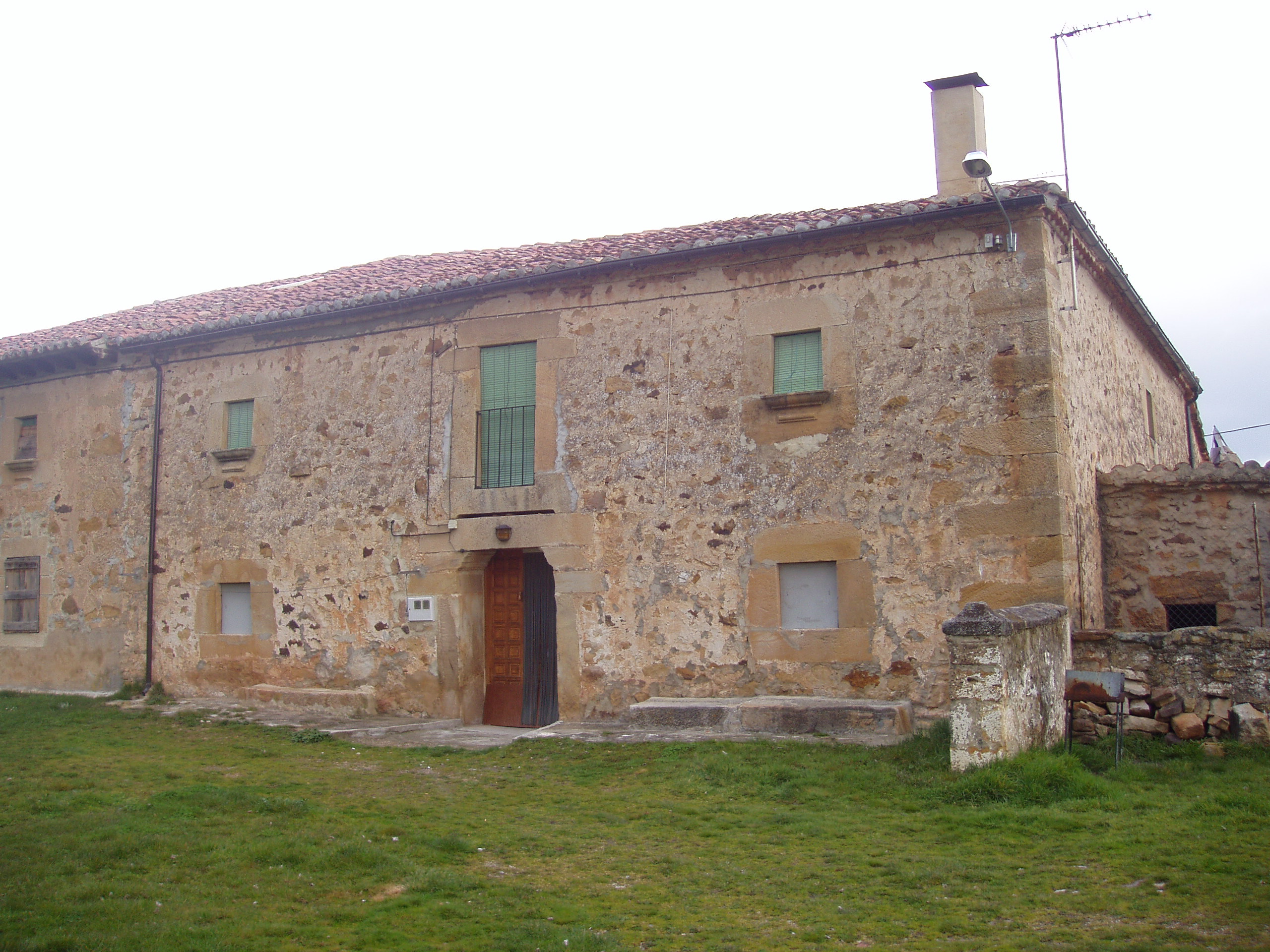 Casa pinariega ; casa tradicional de las provincias de Soria y Burgos. Villaverde del Monte, Soria, España.